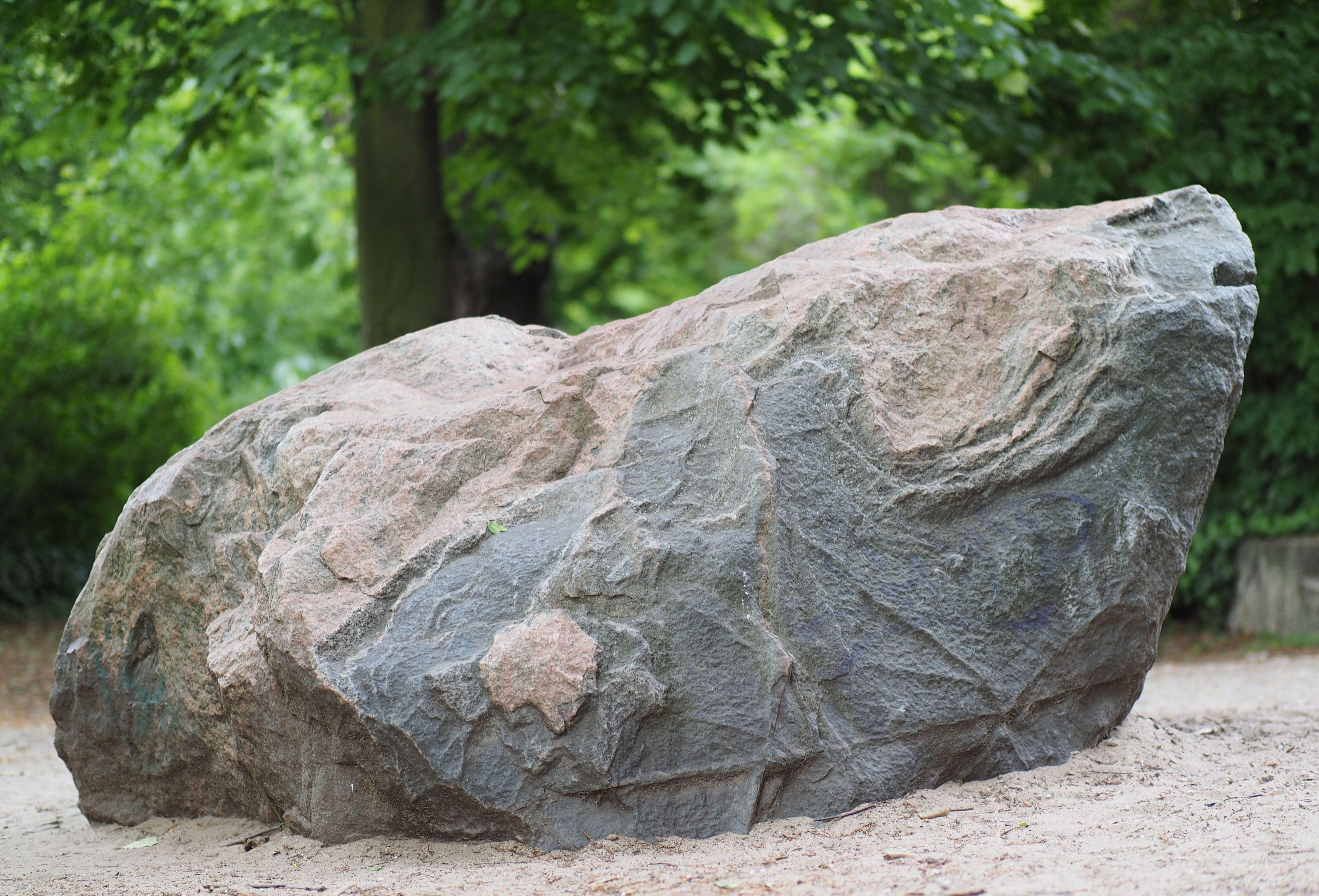 Findling, Naturdenkmal 7-1/F im Bosepark in Berlin-Tempelhof